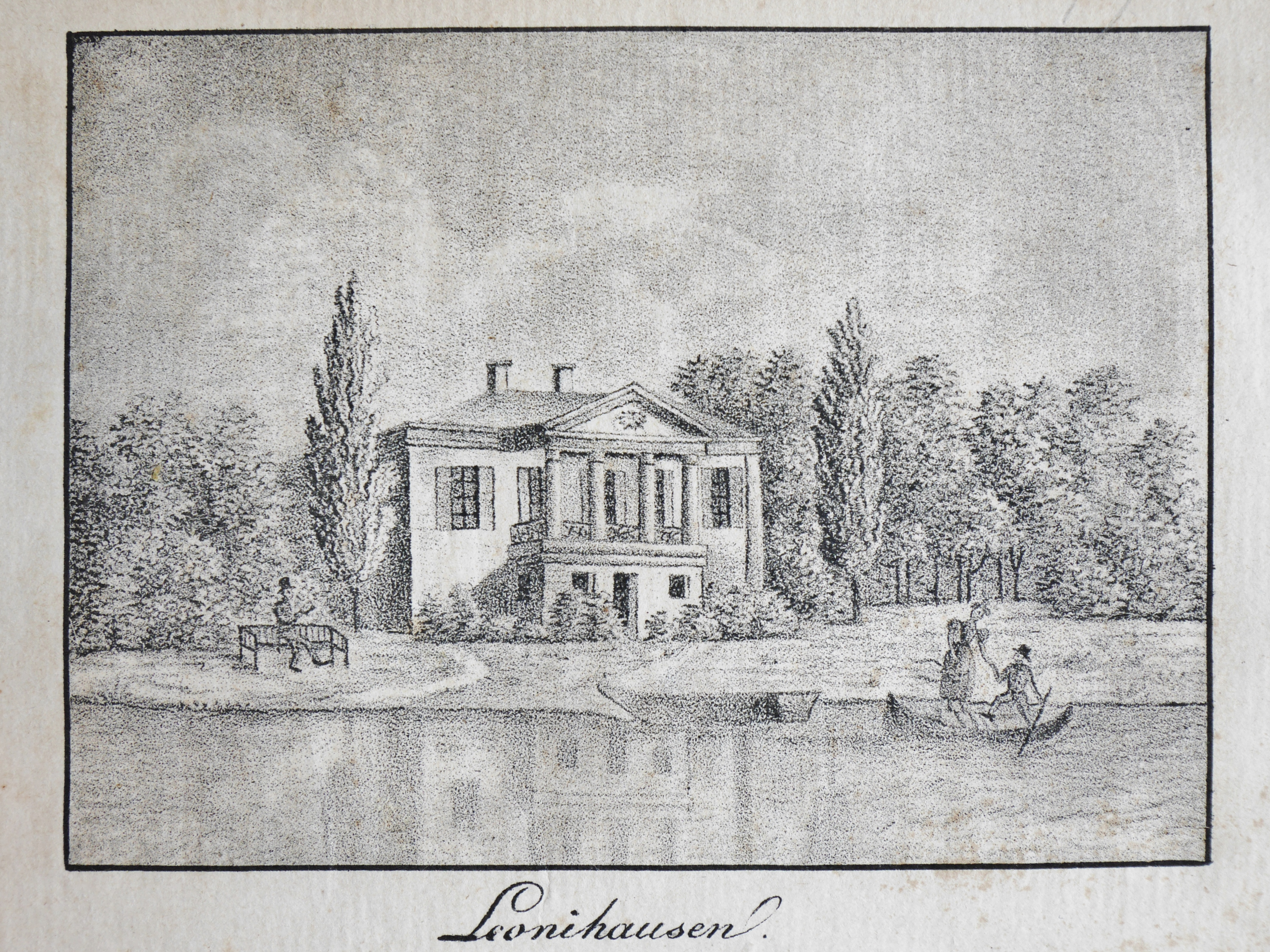 Gasthaus Leoni (Leonihausen) am Starnberger See. Zeichnung in: Adolf von Schaden: Neueste topographisch-statistisch-humoristische Beschreibung des Würm- oder Starnberger-Sees, seiner Ufer und interessanten Umgebungen. München 1832, nach S. 98